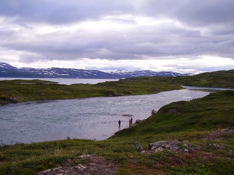 Durchfluss vom Virihaure zum Vastenjaure (Schweden)